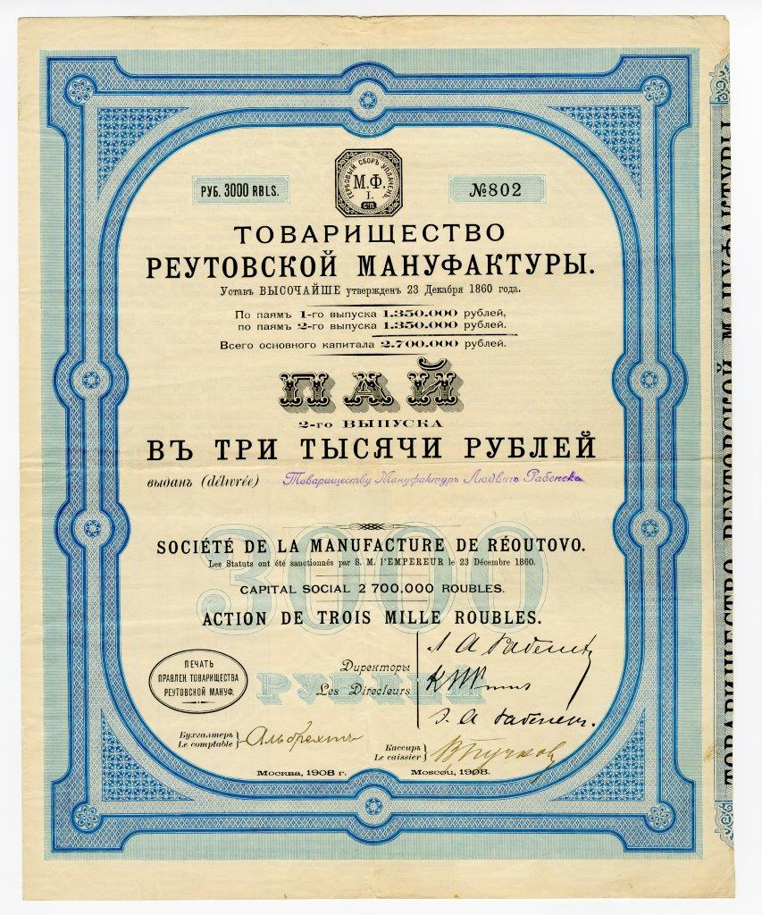 Пай 2-го выпуска в 3 тыс. руб. Товарищества Реутовской мануфактуры, выданный Товариществу мануфактур Людвиг Рабенек. Москва, 1908 г.